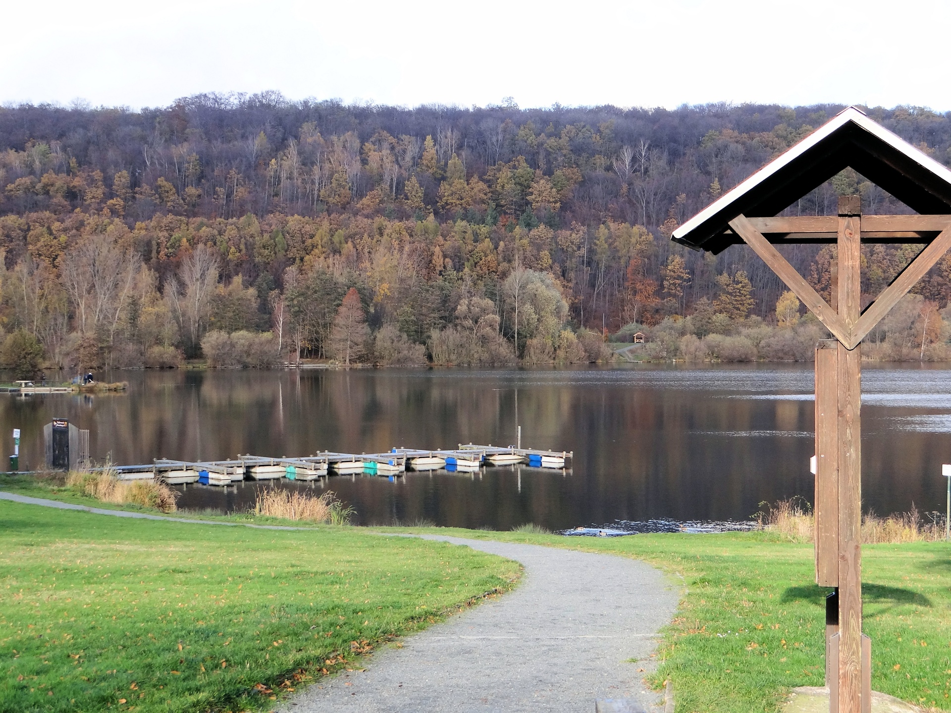 Vienenburger See von Süden mit Blick auf Infortafel Fischerverein, Steganlage und Harly-Wald.